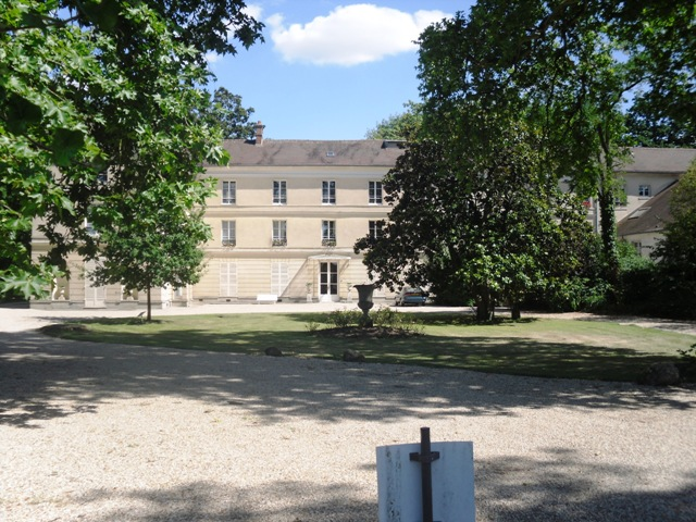 La maison de retraite de la Cossonnière à Sainte-Geneviève-des-Bois (91)